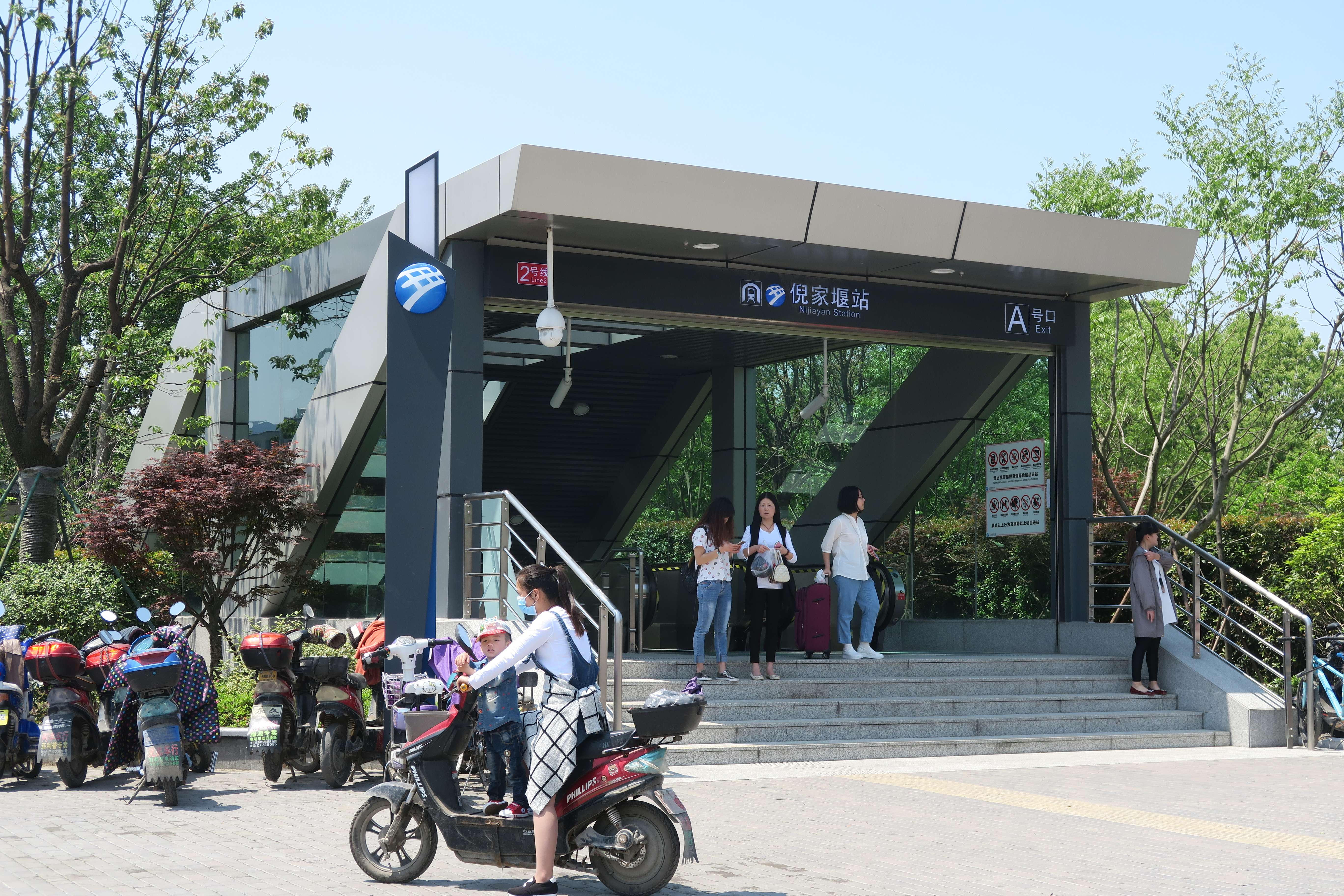 宁波地铁倪家堰站